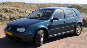 Volkswagen Golf mod IV 2002